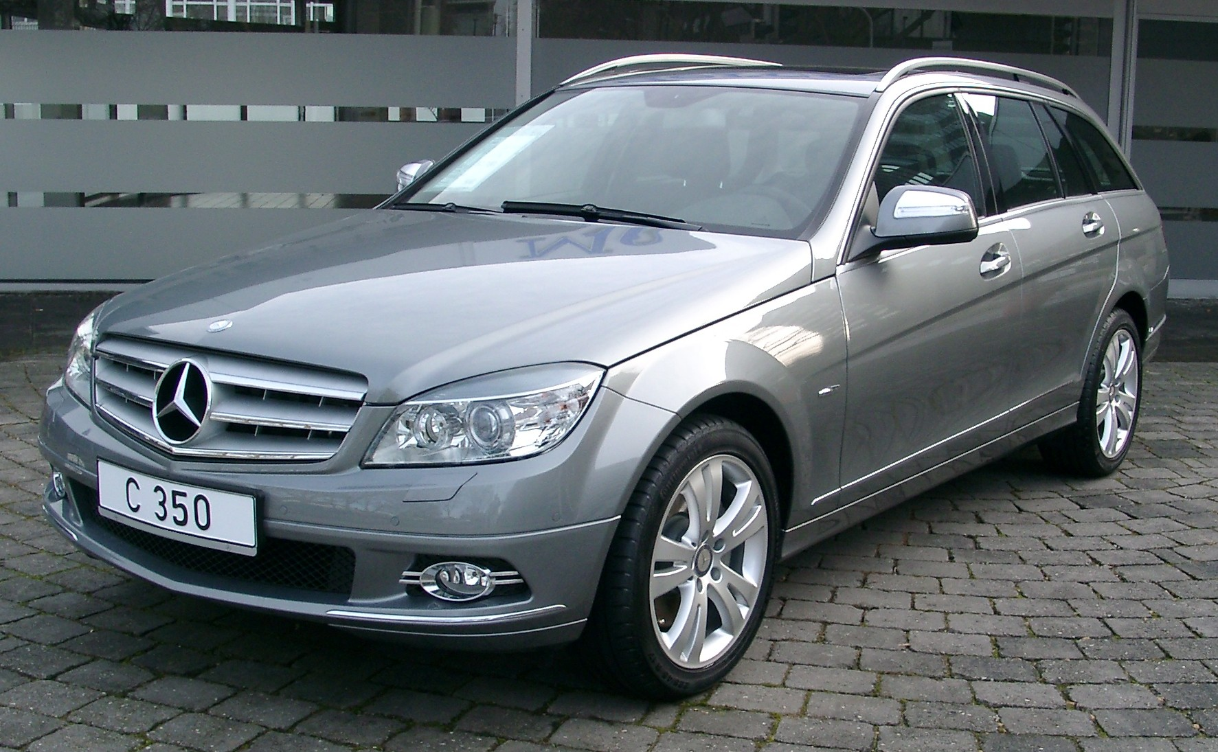 Mercedes-Benz W204 T-Modell (S 204)